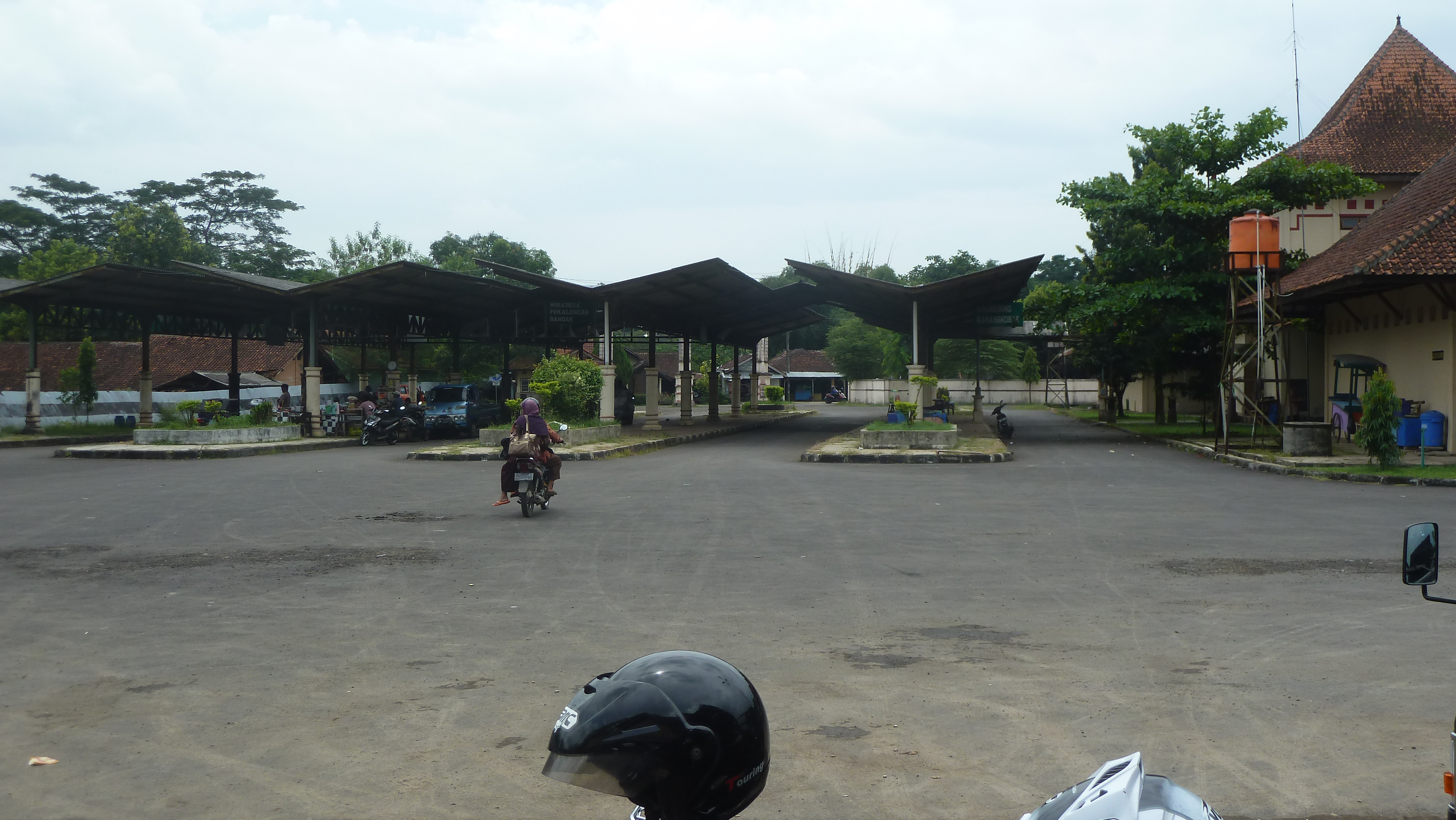 Terminal Bis Kajen